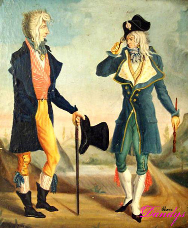 "Les deux incroyables"